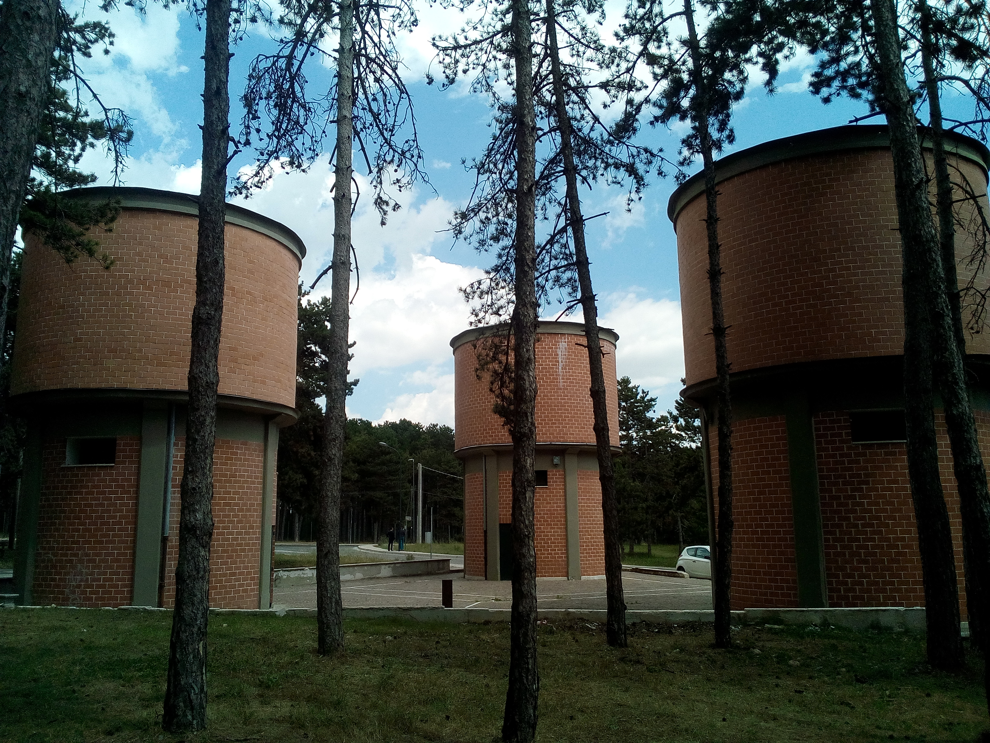 Tre Conche